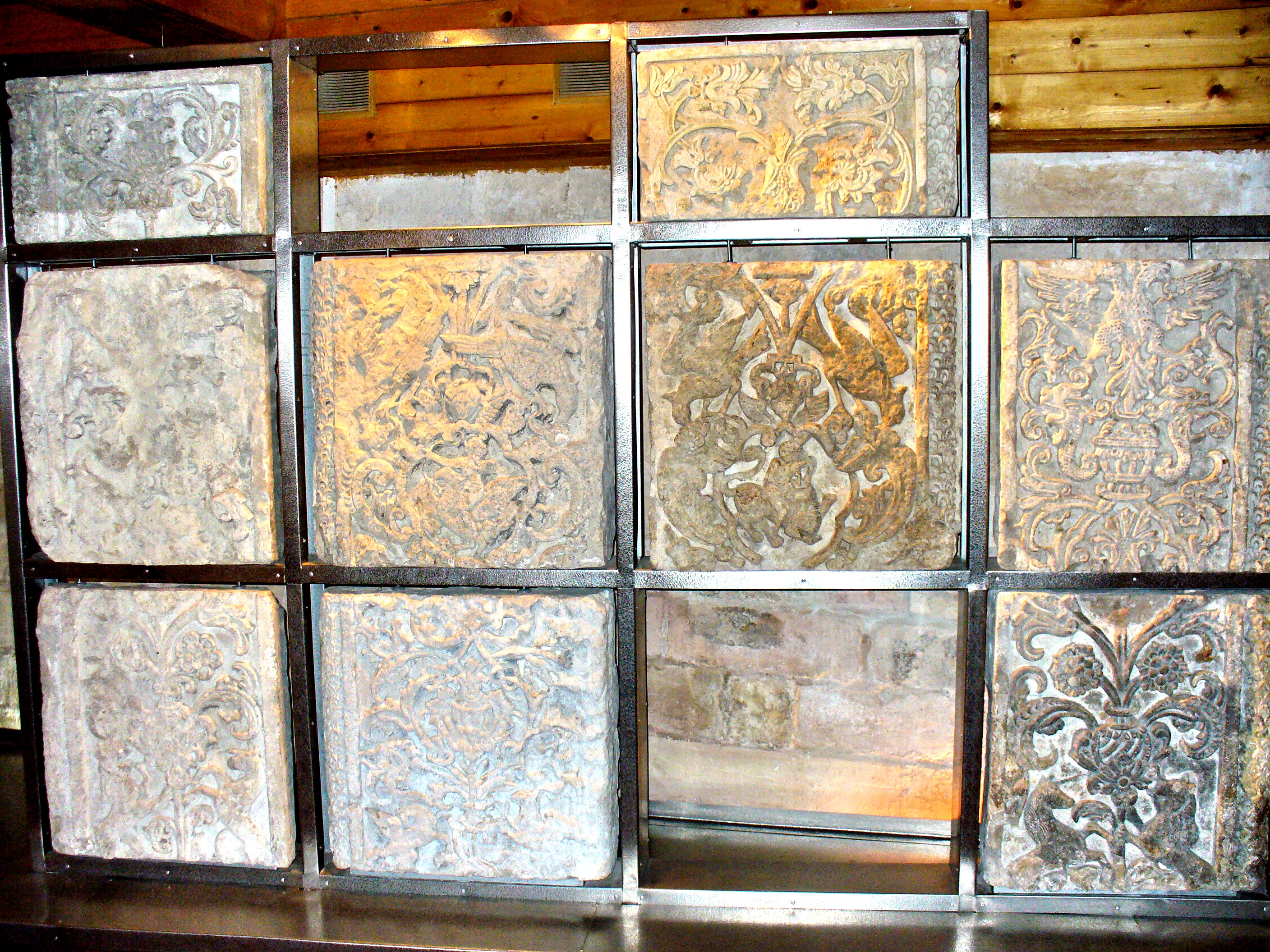 Фрагменты "Львиных ворот". Середина XVII века. Белый камень, резьба.